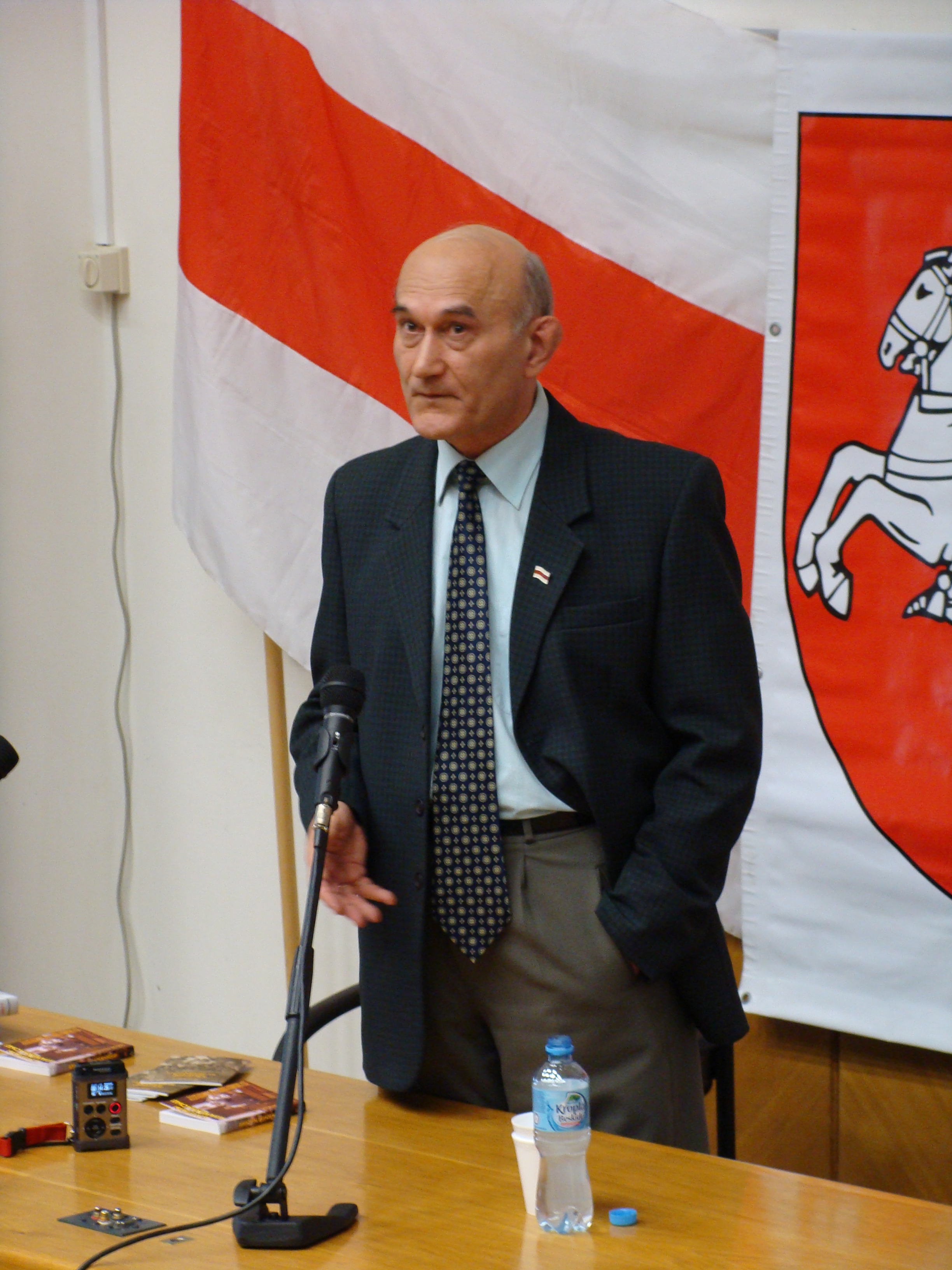 Zianon Pazniak na spotkaniu w Collegium Civitas w Warszawie.